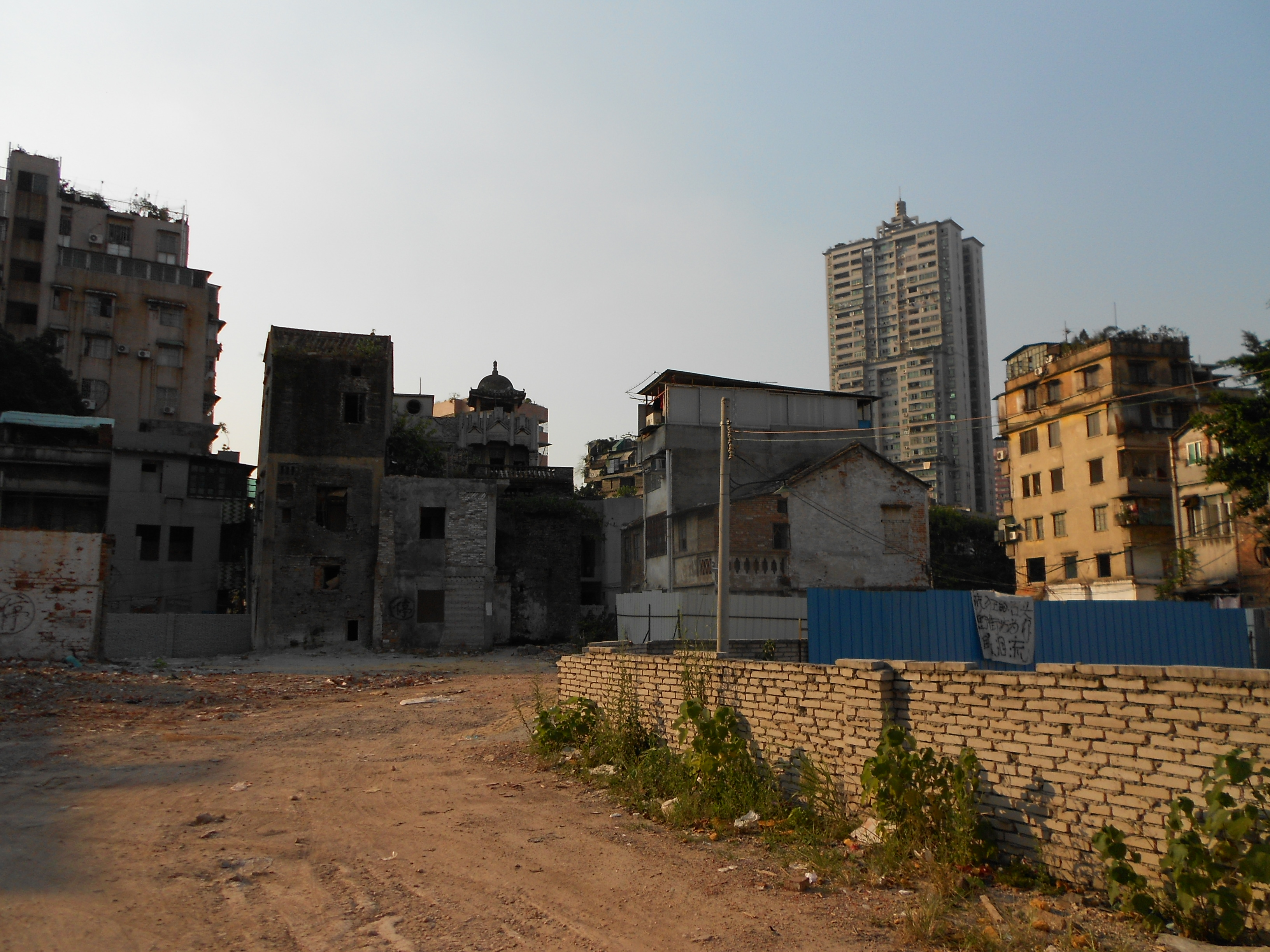 恩寧路舊城改造項目，到處是頹垣敗瓦。